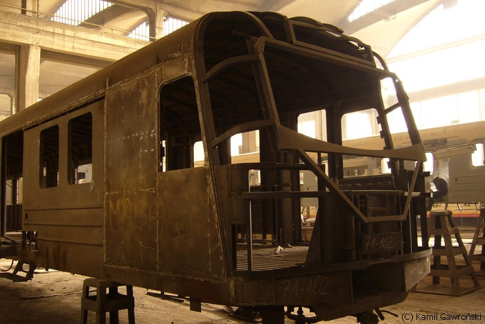 Pudło członu rozrządczego elektrycznego zespołu trakcyjnego EN71KM-102 podczas modernizacji w ZNTK Mińsk Mazowiecki.